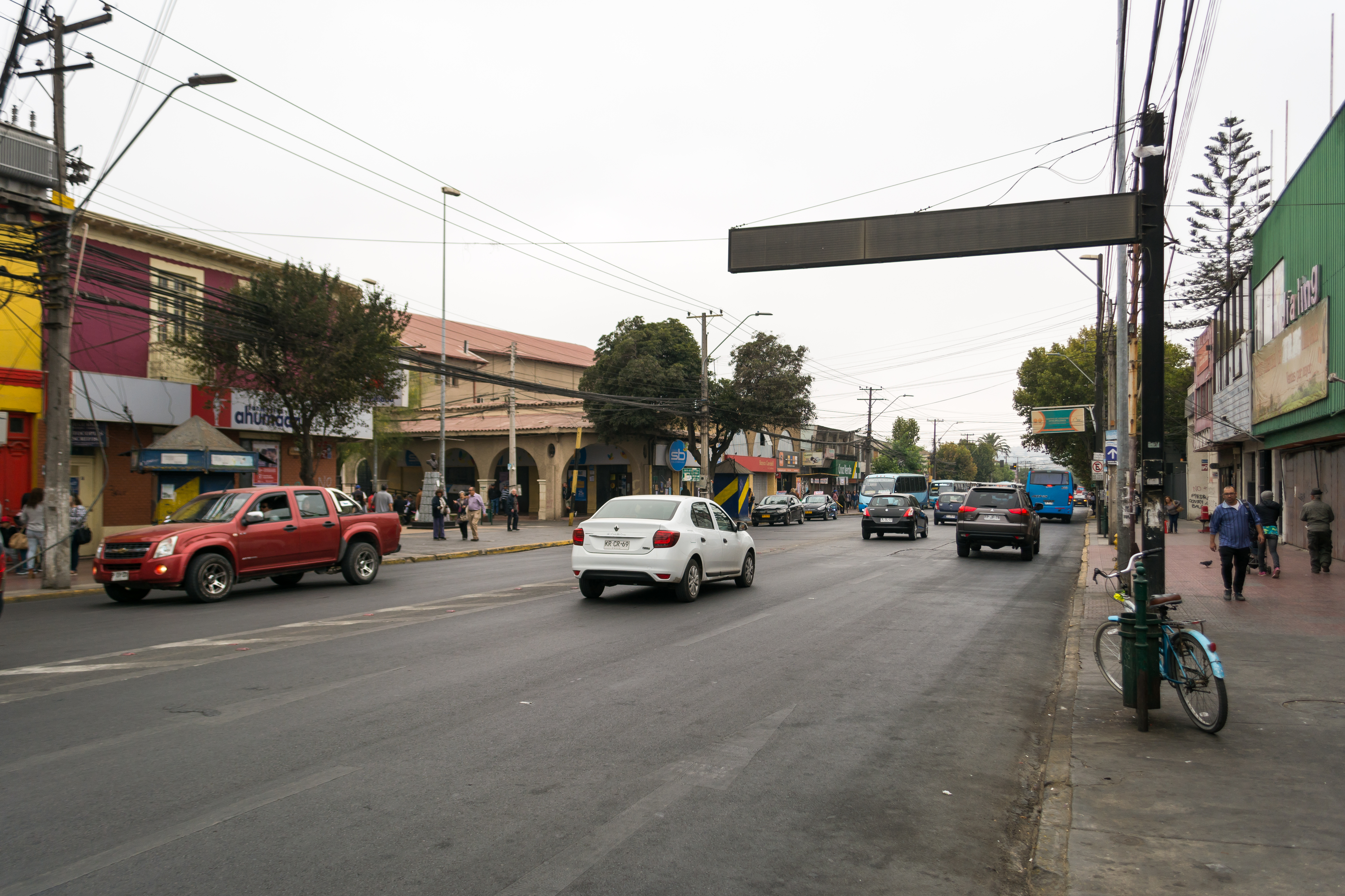 Avenida Valparaíso, Villa Alemana, Región de Valparaíso, Chile